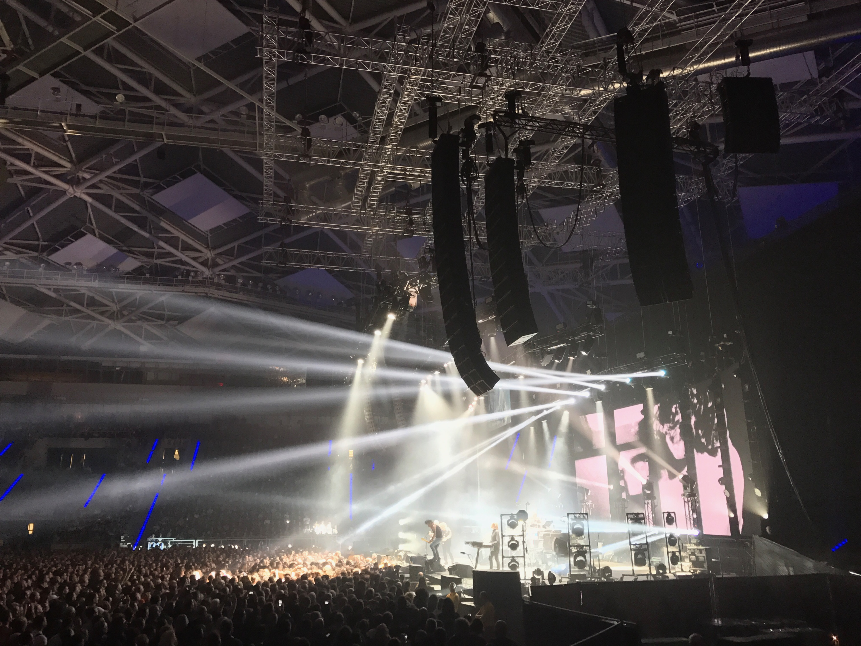 The Cure podczas koncertu w Atlas Arena w Łodzi podczas trasy koncertowej 2016.